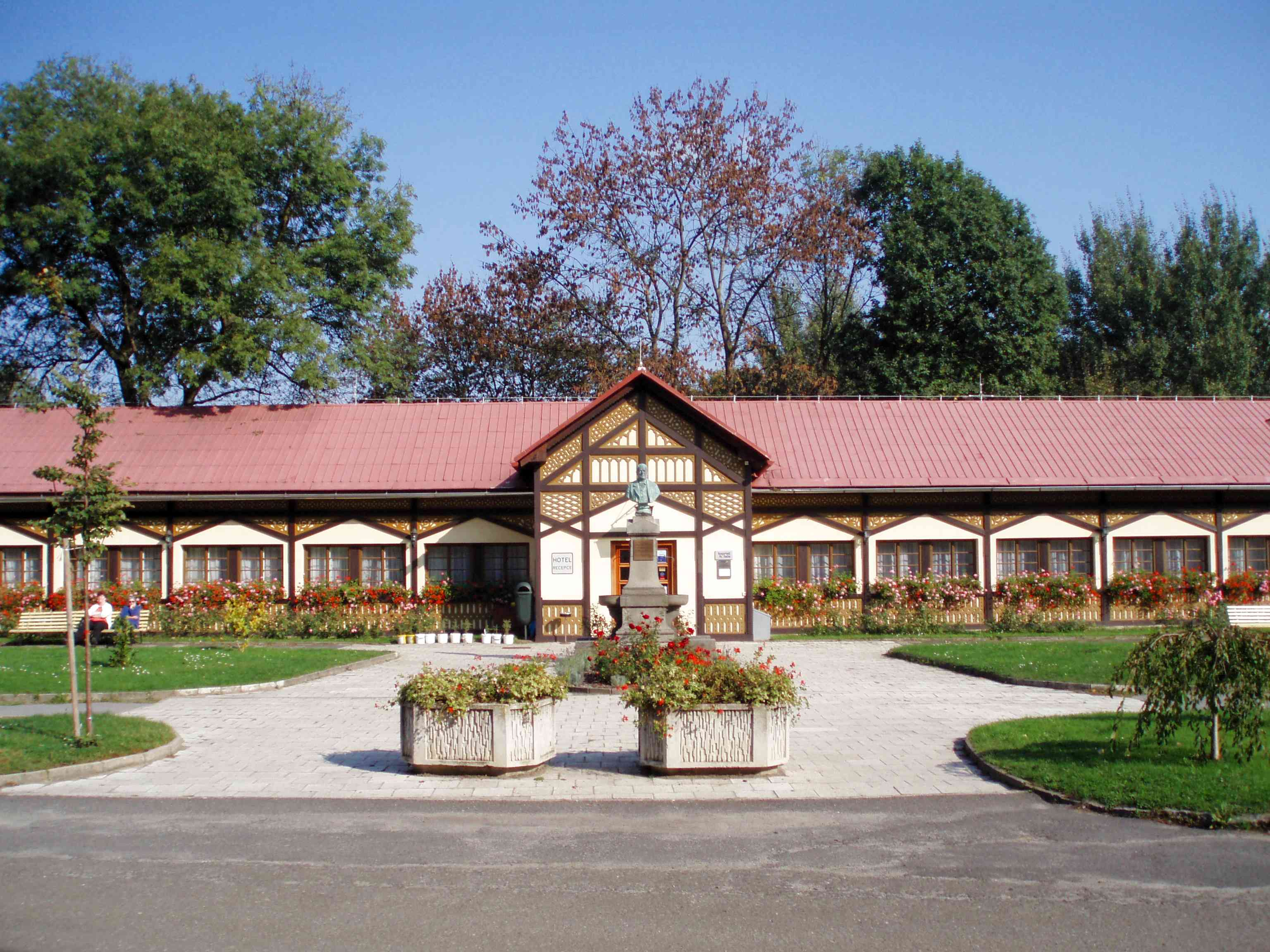 Kuranlagen Sedmihorky